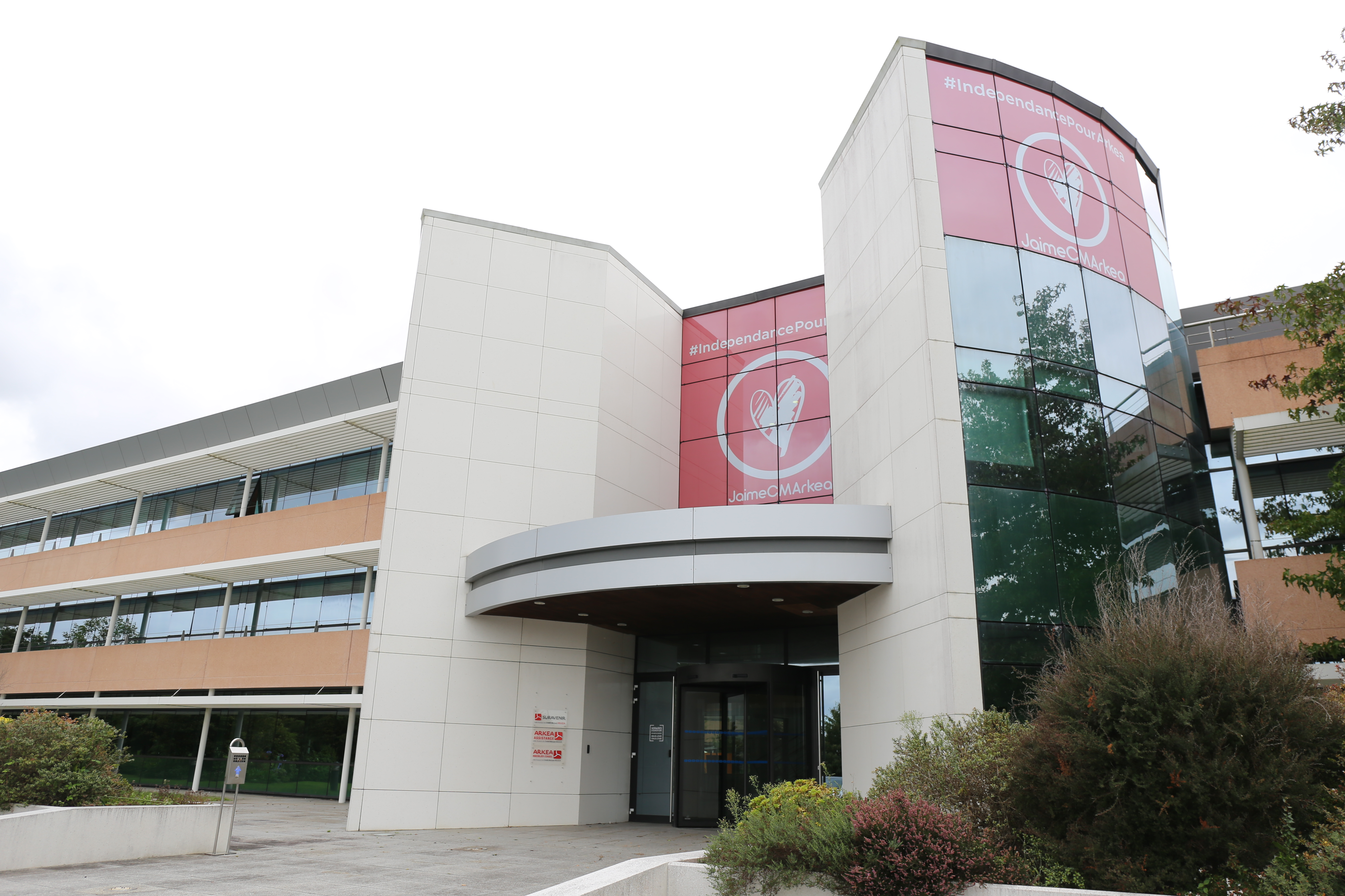 Extérieur du bâtiment de Suravenir, filiale du Crédit Mutuel ARKEA, acteur du secteur des contrats d’assurance-vie, de prévoyance et d’épargne retraite entreprise. L’entreprise est située rue Général Paulet à Brest (Finistère). En 2018 la façade était recouverte par le message #IndependancePourArkea et son cœur rouge "J'aime Arkea".